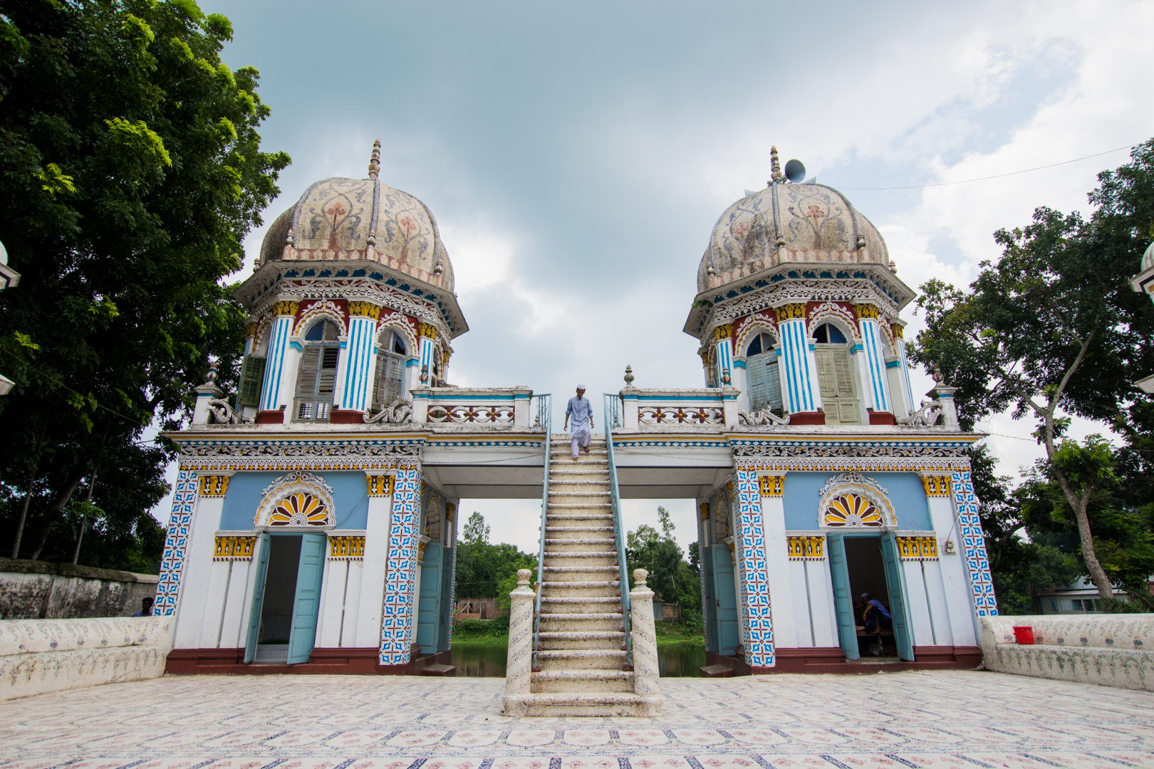 ধনবাড়ী মসজিদ